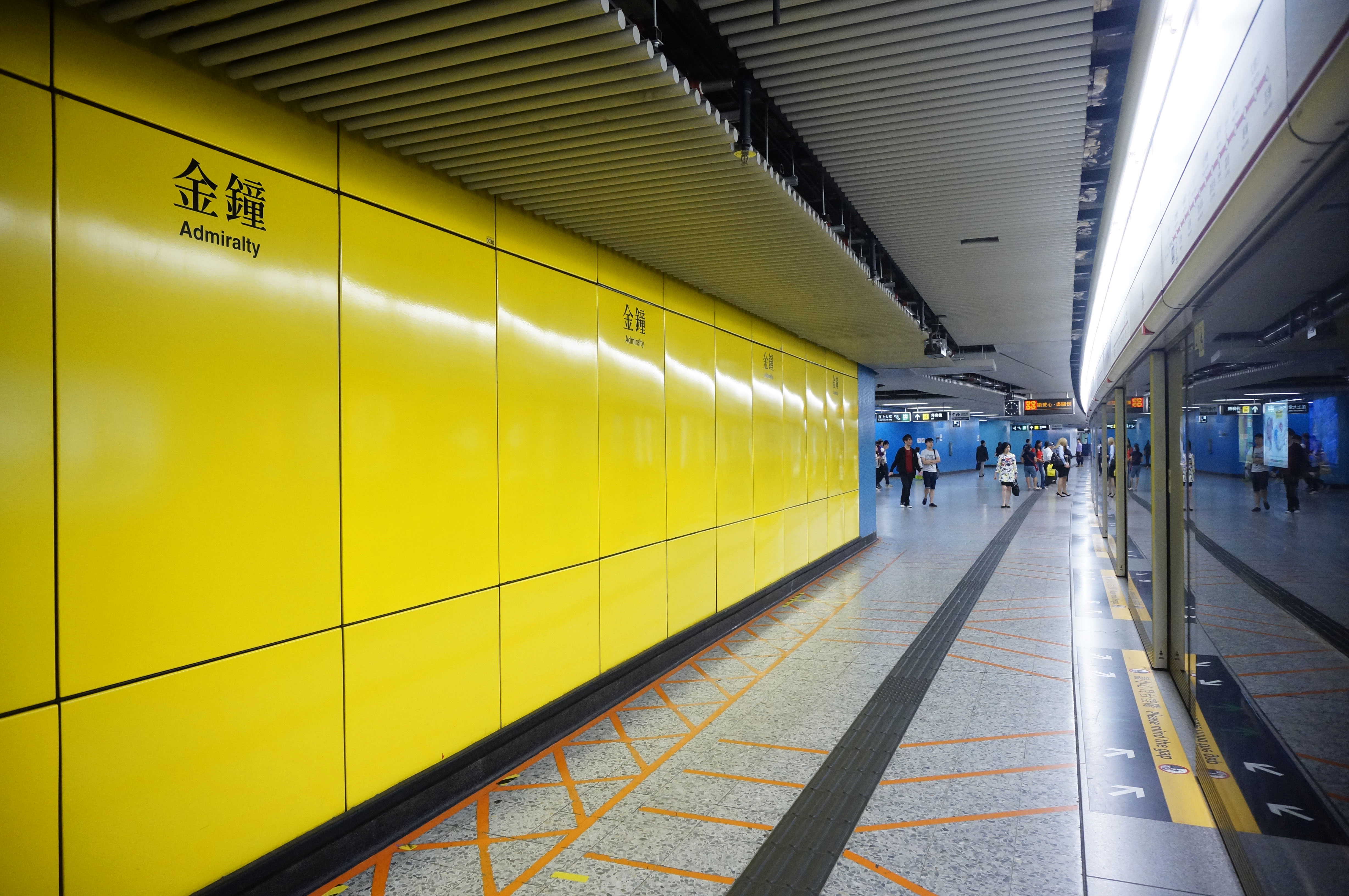 港鐵金鐘站月台